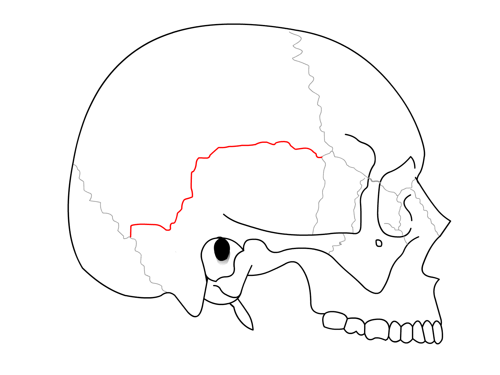 Schädel seitlich - Sutura